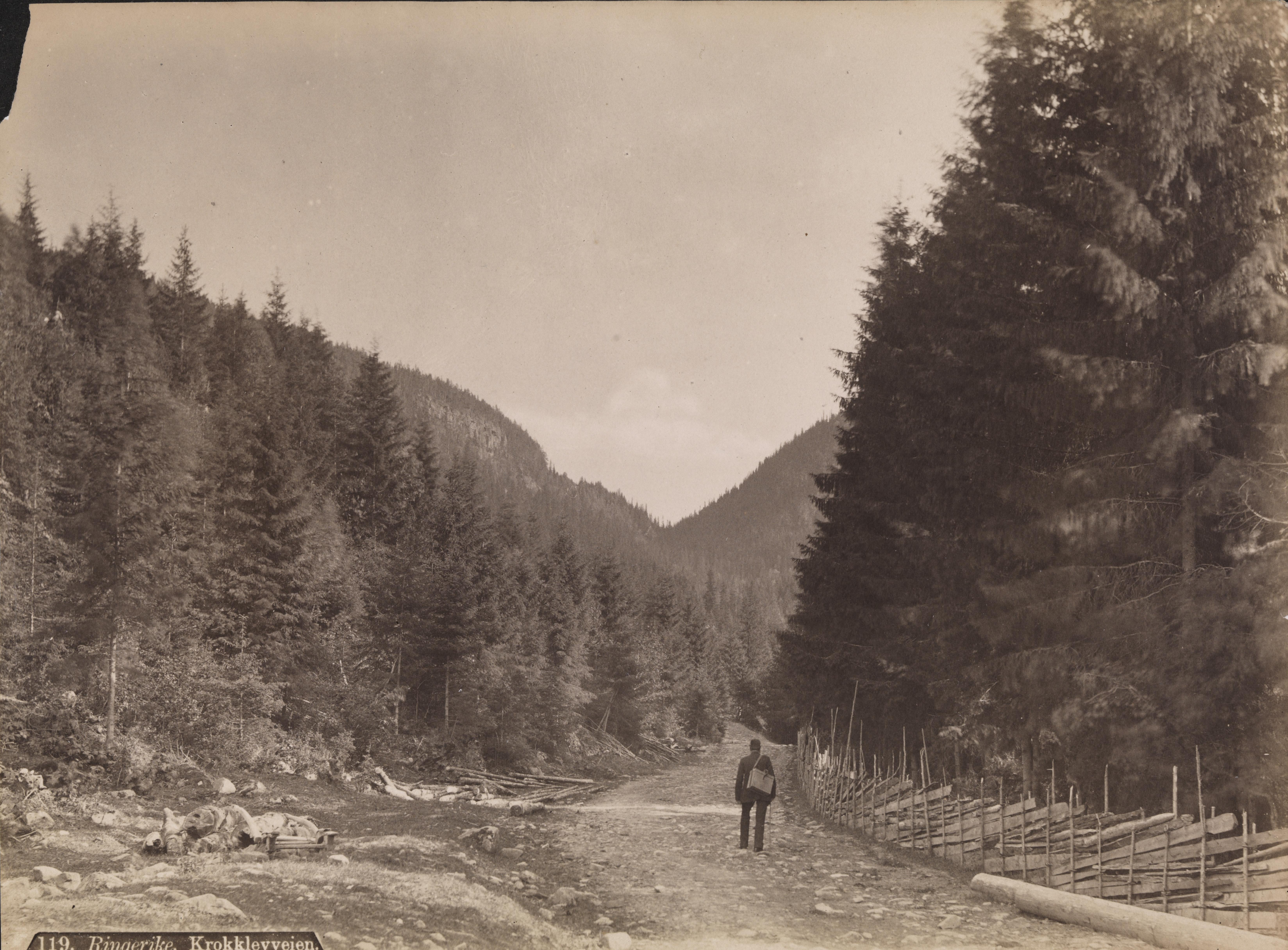 Sted: Kommune: Fylke: Tagger: veier landskapsfotografi samferdselsfotografi